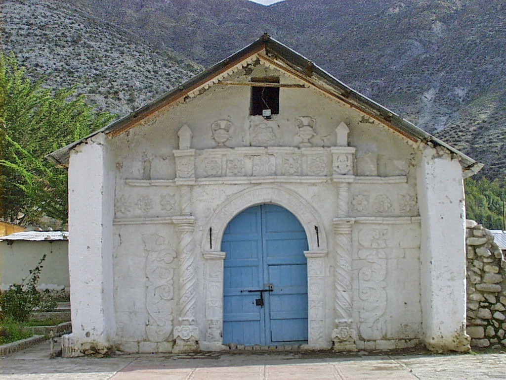 Iglesia de San Santiago de Belén This is a photo of a national monument in Chile: 2228